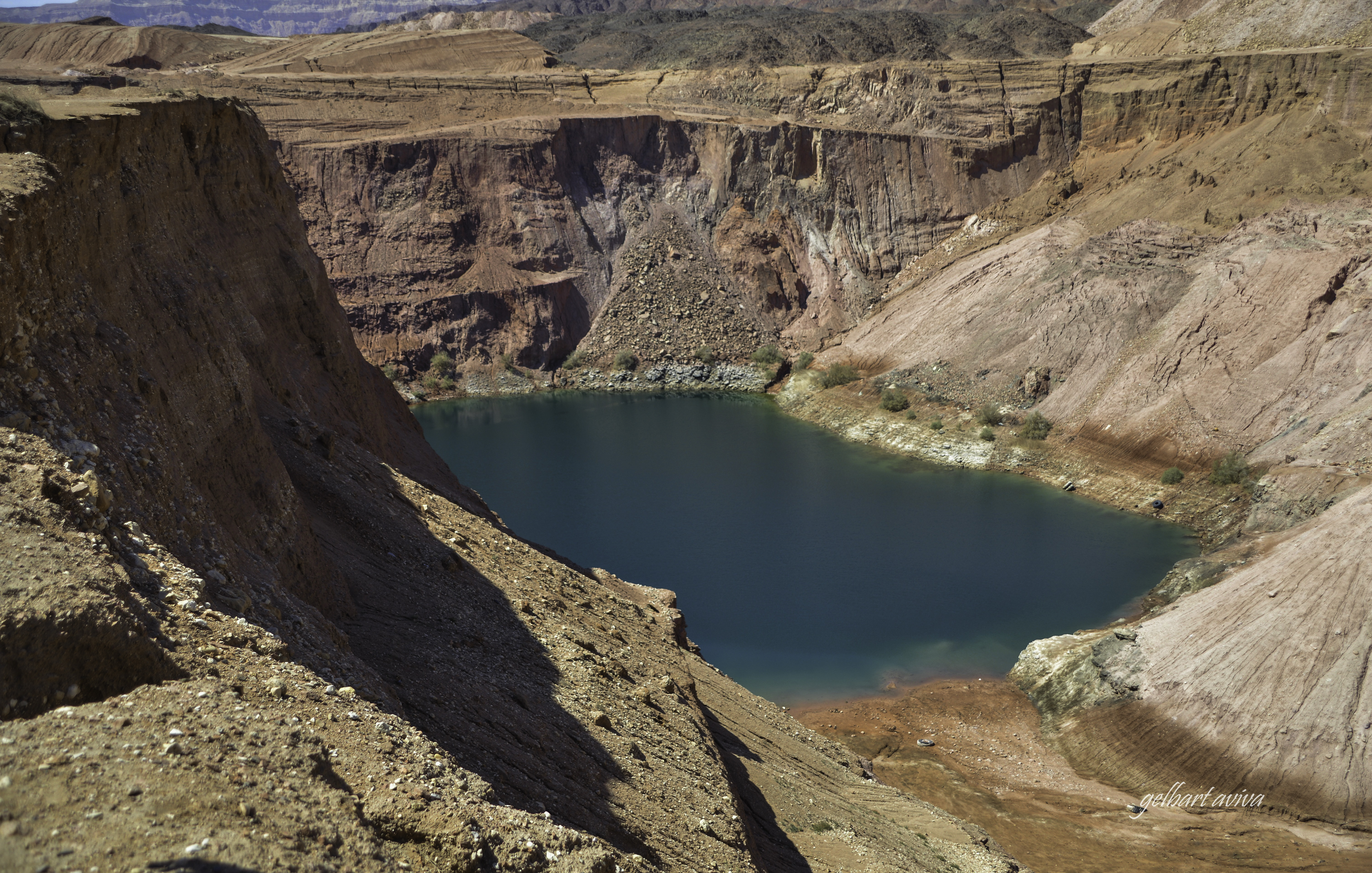 בקעת תִּמְנָע היא בקעה בשוליים המערביים של הערבה הדרומית, כ-25 קילומטר מצפון לאילת. הבקעה, שלהּ צורת פרסה, משתרעת על פני שטח של כ-60 קילומטר רבוע, ותחומה במצוקים תלולים משלושת צדדיה. היא מנוקזת על ידי נחל תמנע בצפון ונחל נחושתן בדרום, הזורמים לערבה שממזרח לה. במרכזהּ מתרומם הר תמנע לגובה של 453 מטרים. באזור שורר אקלים מדברי קיצוני. האדם נמשך לבקעת תמנע החל בתקופה הנאוליתית, בערך 10,000 לפנה"ס ואילך, בשל עפרות הנחושת המצויות בה.